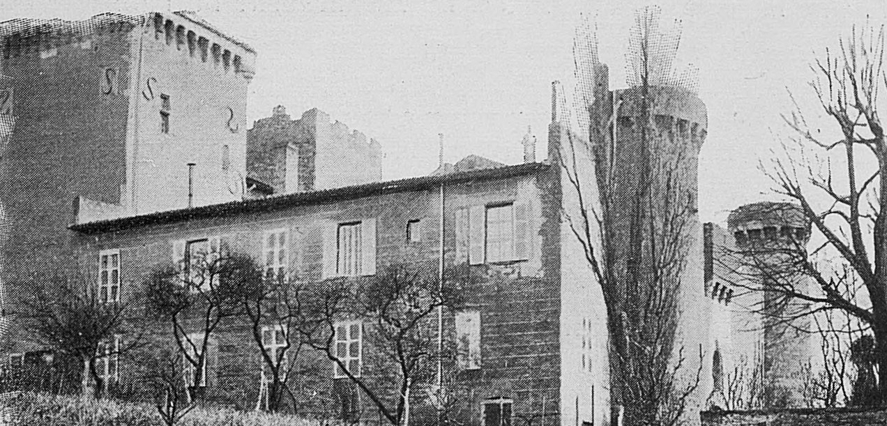 Dictionnaire illustré des communes du département du Rhône. Tome 1 / par MM. E. de Rolland et D. Clouzet.